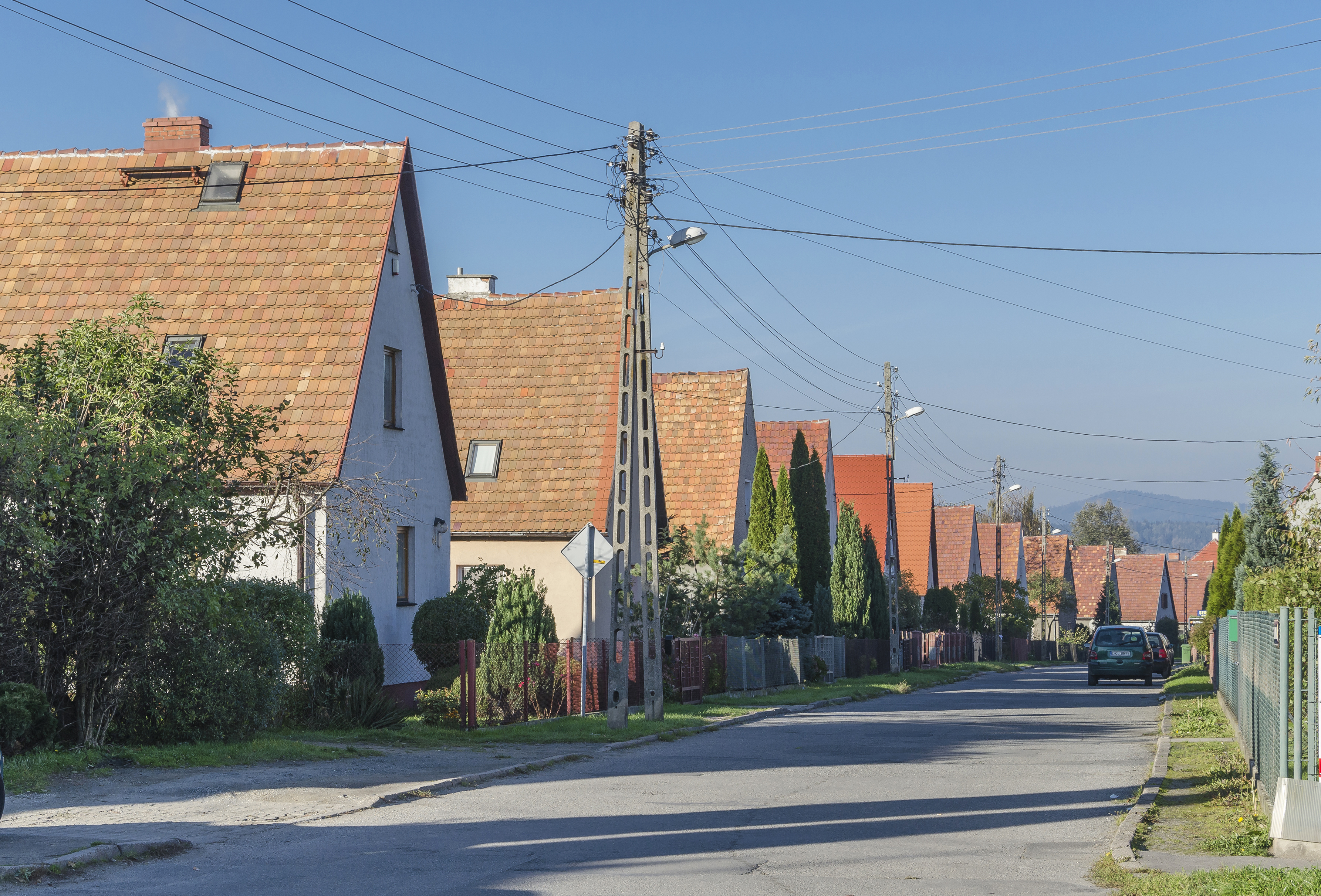 Kłodzko, ul. Długosza